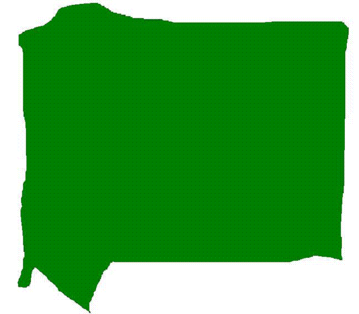 Mapa del barrio Las Colinas Refers to Bogota {es}Wikipedia - Barrio Santa Fe (Los Mártires)